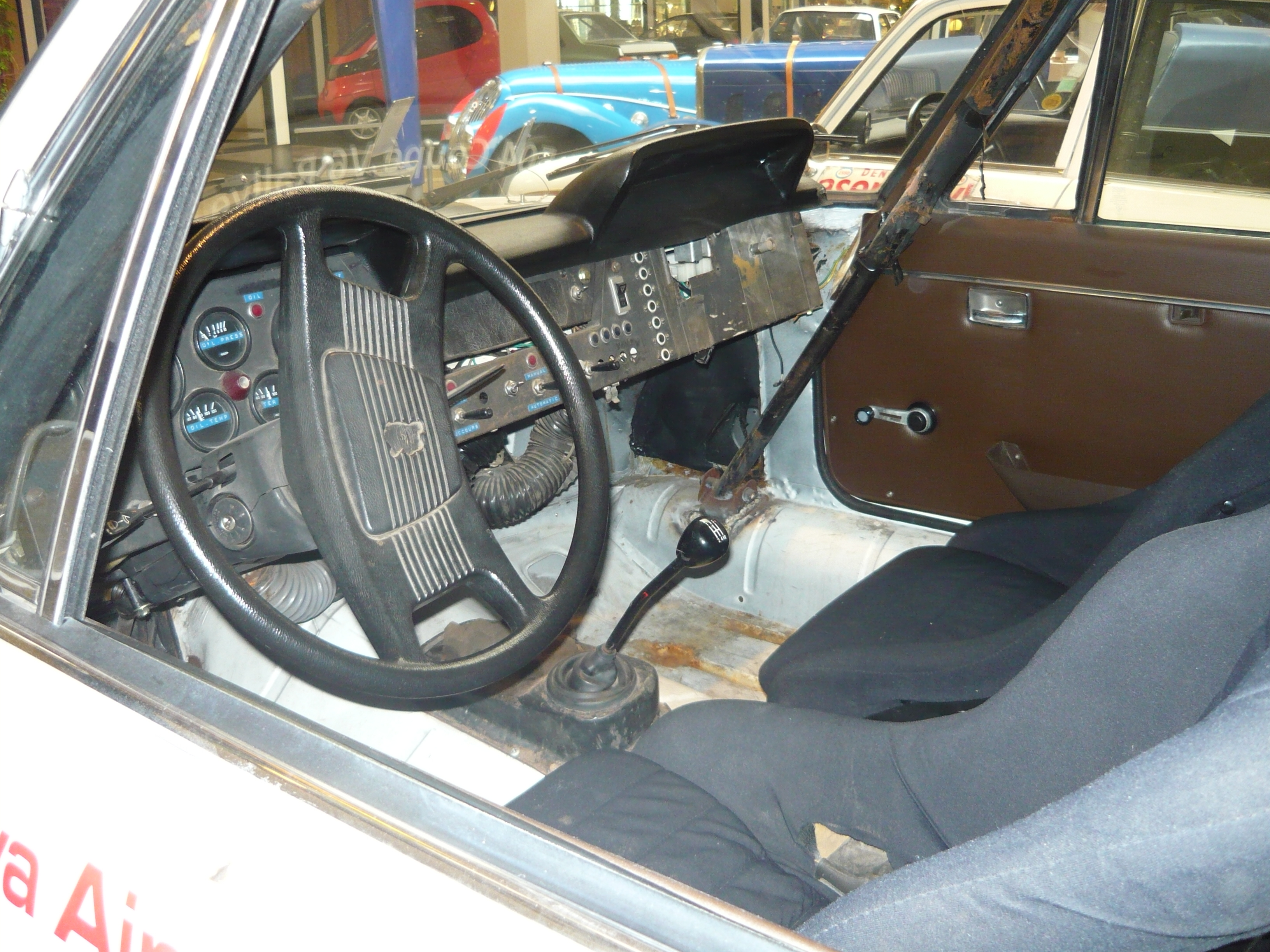 Intérieur de la Peugeot 504 V6 (1978) de Jean-Pierre Nicolas du Safari Rally